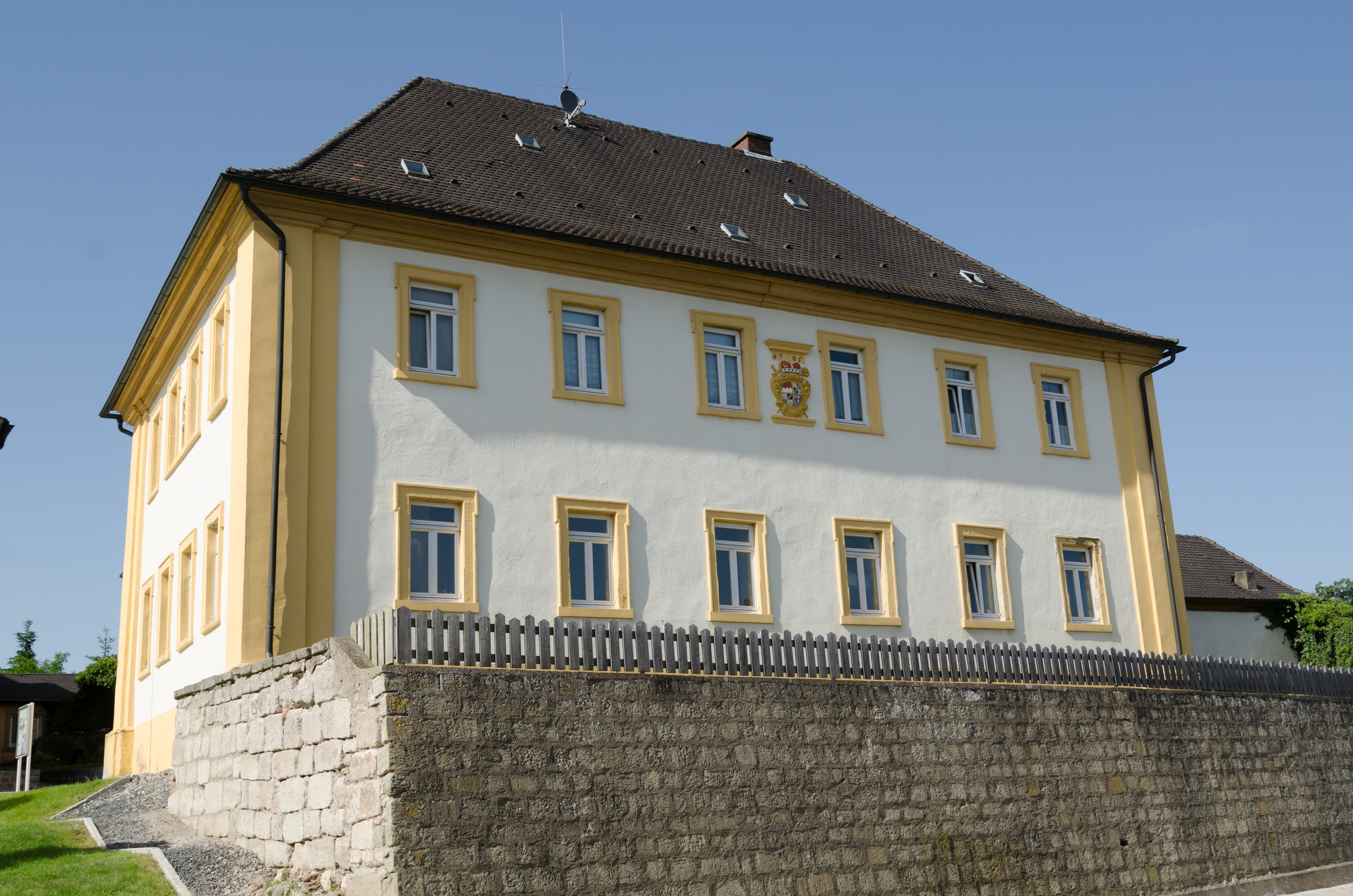 Rauhenebrach, Prölsdorf, Am Landgericht 1